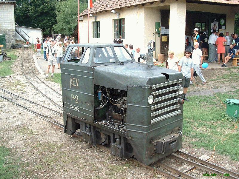 P2-es pályaszámú (2244,4102), MD–40-es típusú mozdony a Kemencei Erdei Múzeumvasúton